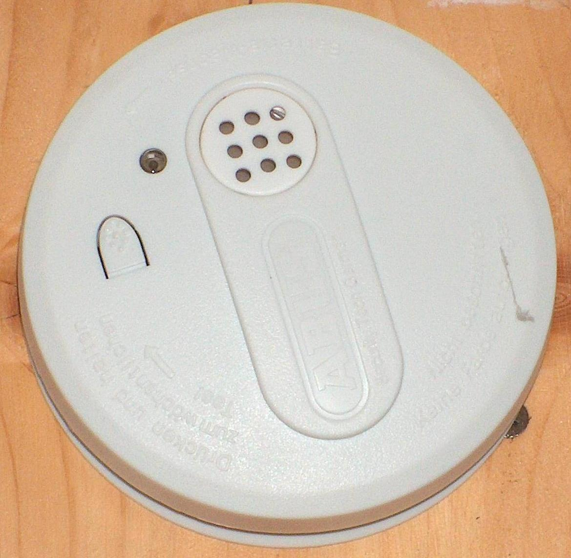 Rauchmelder (mit Blitz fotografieert)